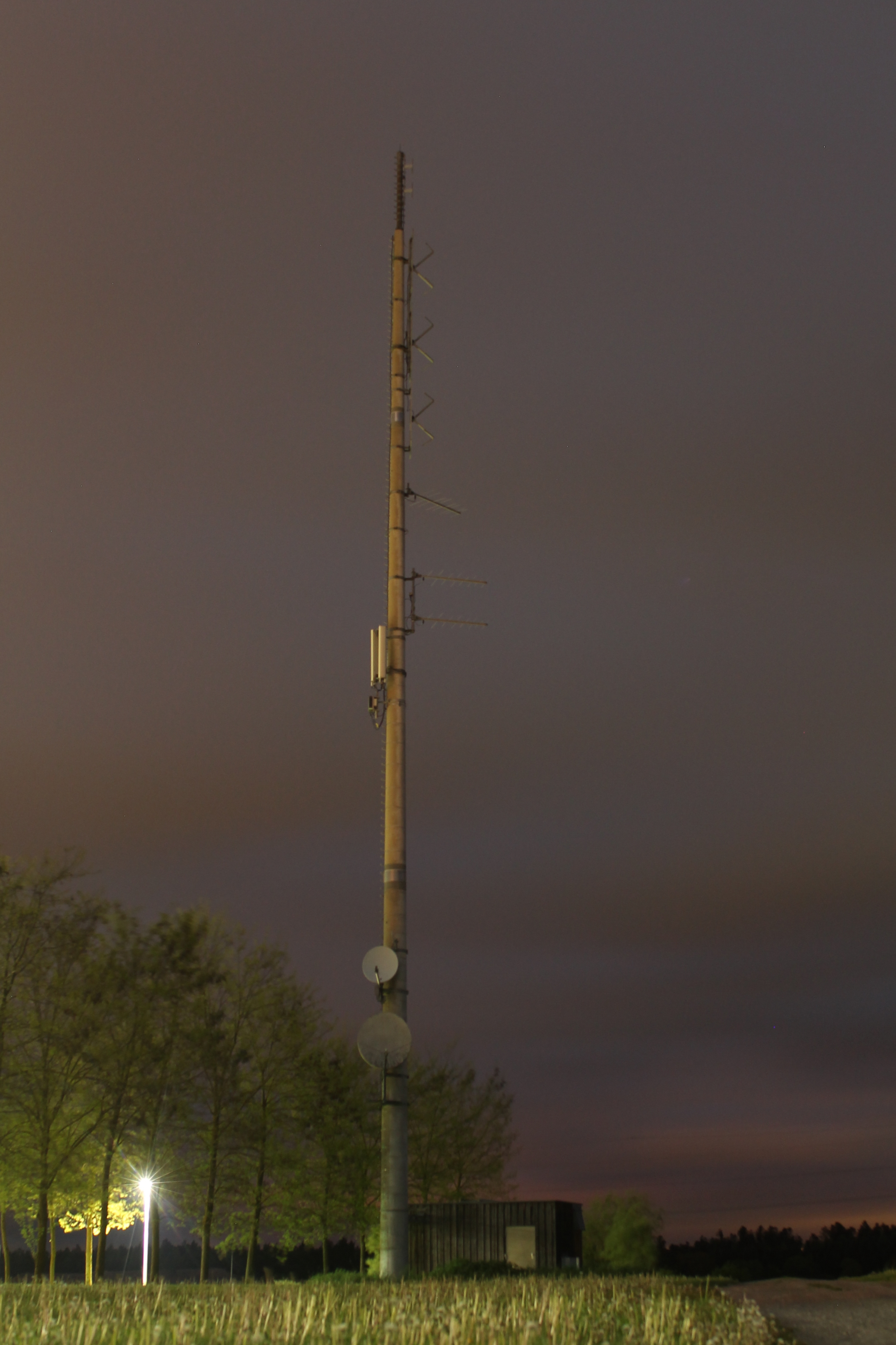 Sender Mötzingen - OpenStreetMap(Info)